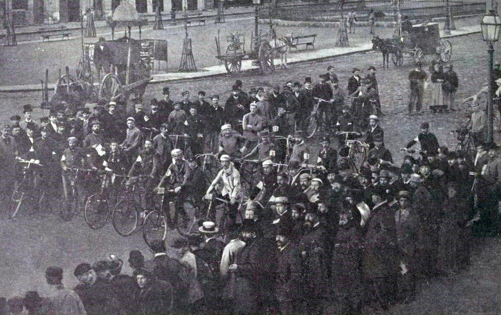 Légendé originale erronée: Le 1er Paris-Brest-Paris. En haut: le départ du 1er Paris-Brest-Paris (1.200 kil.) organisé par le Petit Journal et gagné par Terront, en 71 b. 22 (6-9 sept. 1891) pour cause d'inversement entre image haute et image basse dans La Vie au grand air du 15 décembre 1920 (voir les autres versions publiées par Le Sport universel illustré le 14 mai 1898 et par Le Miroir des sports, le 21 mai 1929). Légende corrigée: Le 1er BORDEAUX-PARIS. En bas [En haut] : le départ du 1er Bordeaux-Paris (572 km) gagné par l'Anglais Mills en 26 h. 36 m. 57 s. devant Holbein et Edge (23-24 mai 1891).